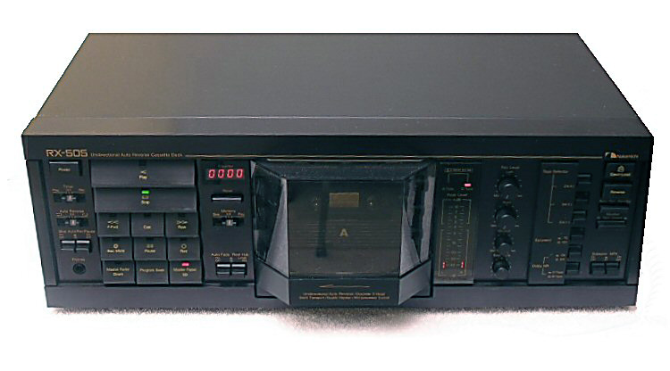 Nakamichi RX 505